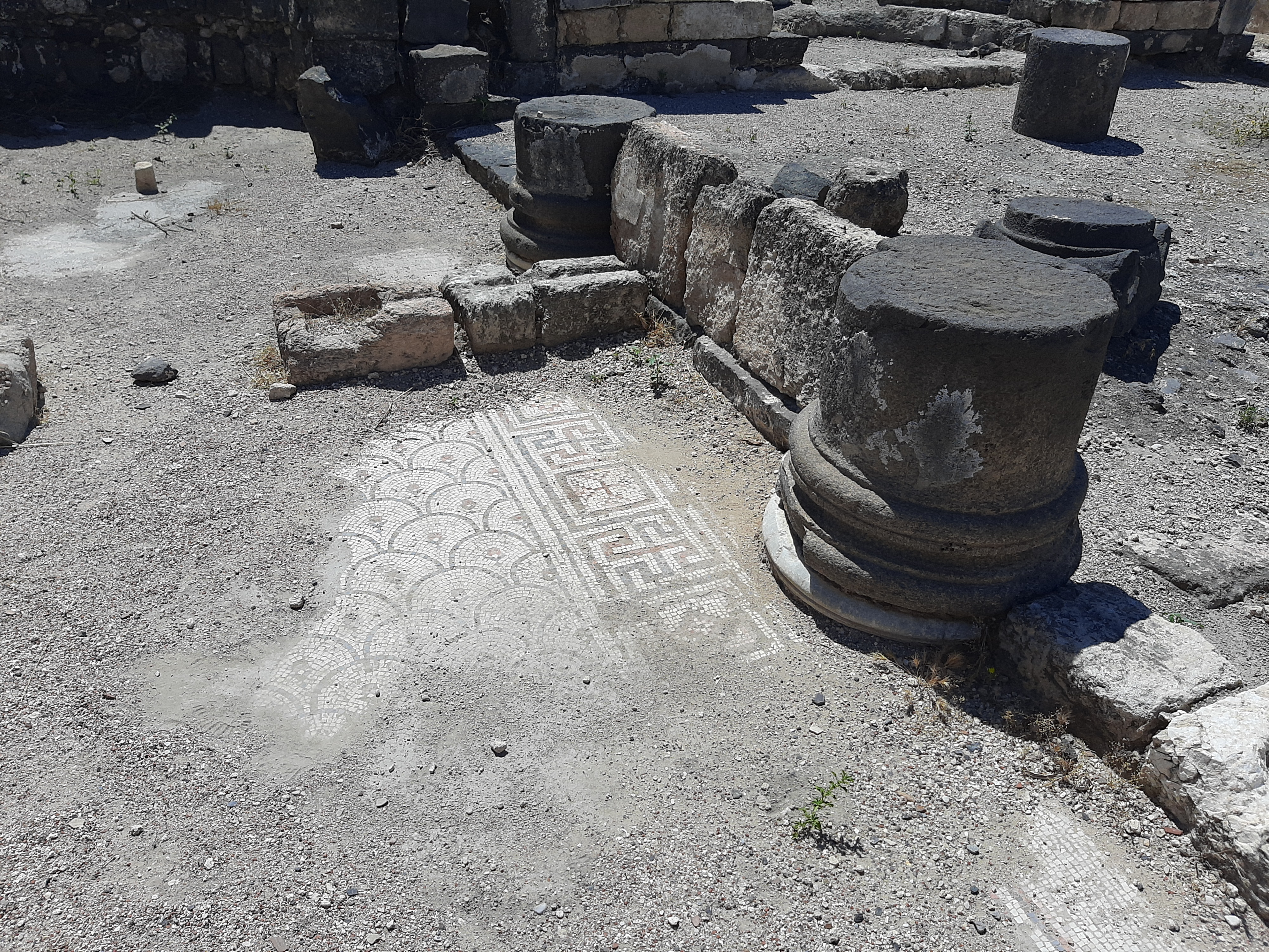 أثار في موقع هيبوس/الحصن/سوسيتا، قبل مراحل الترميم